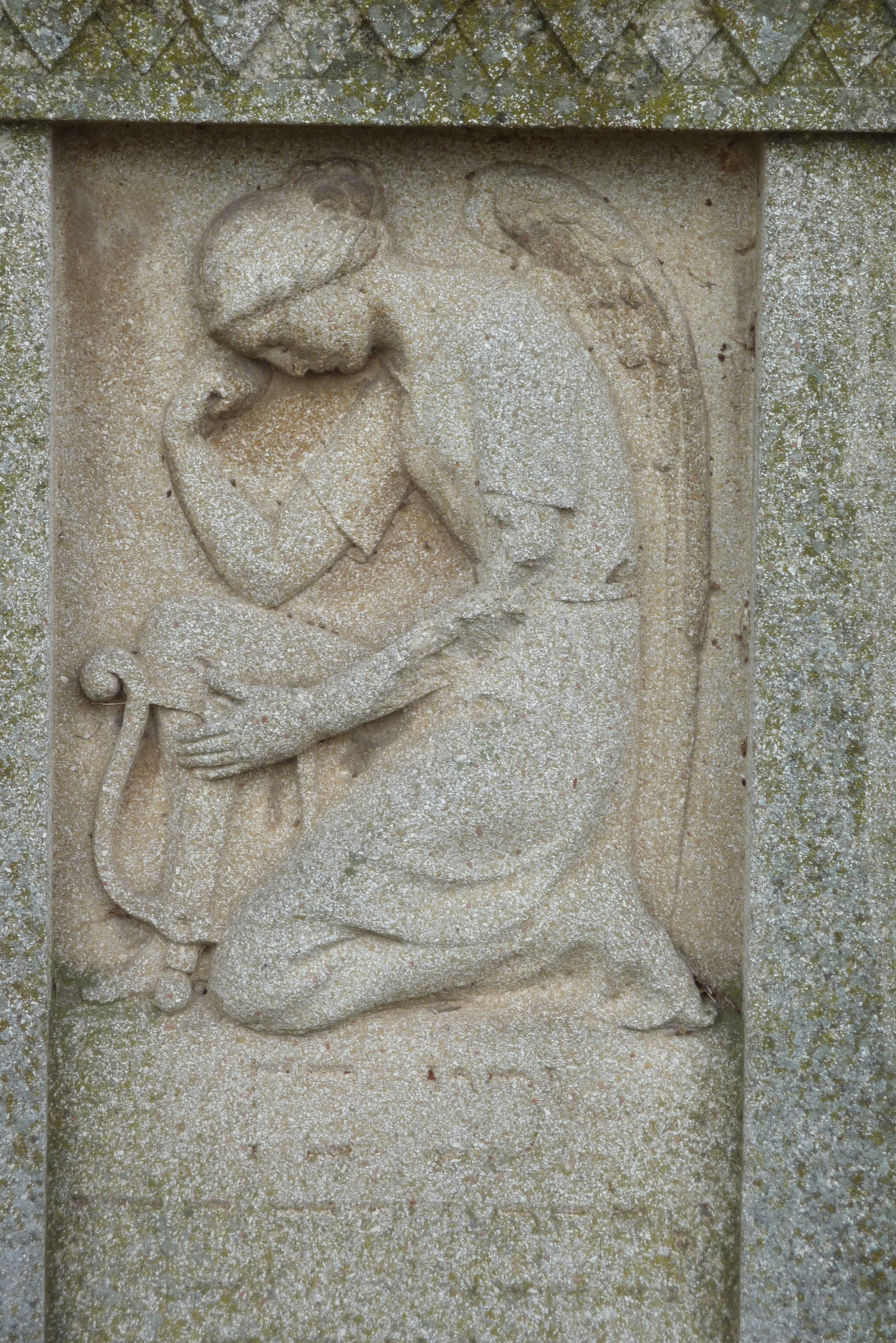 Jüdischer Friedhof Kuchenheim, Grabstein